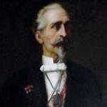 Picture of Francisco de Albear y Fernández de Lara’’’